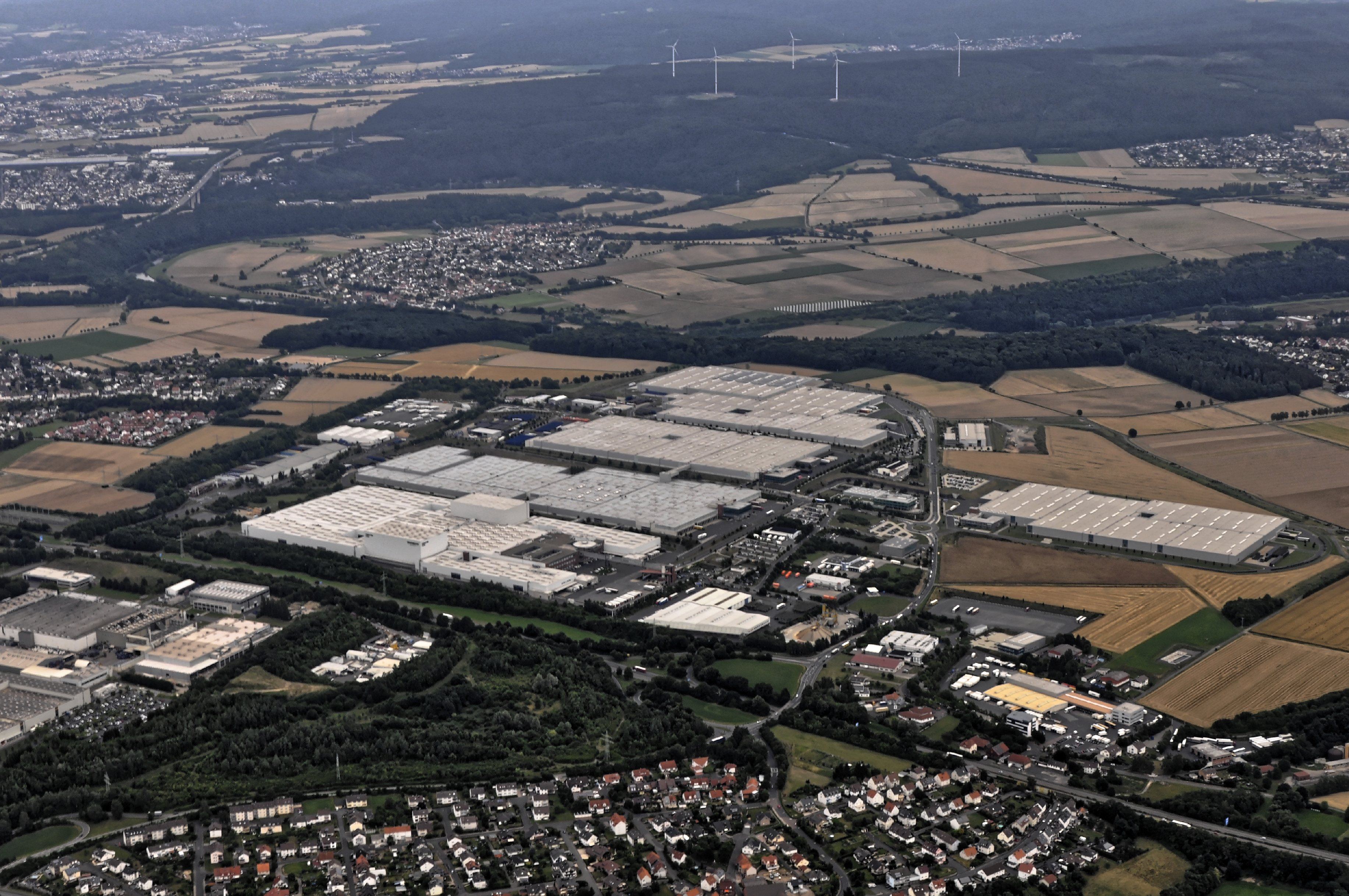 Bilder vom Flug Nordholz-Hammelburg 2015: Das Volkswagenwerk Baunatal. Im Vordergrund Teil von Kirchbauna, links neben dem Werk Rengershausen, am gegenüberliegenden Fuldaufer die zusammengewachsenen Ortsteile Dennhausen/Dittershausen der Gemeinde Fuldabrück.